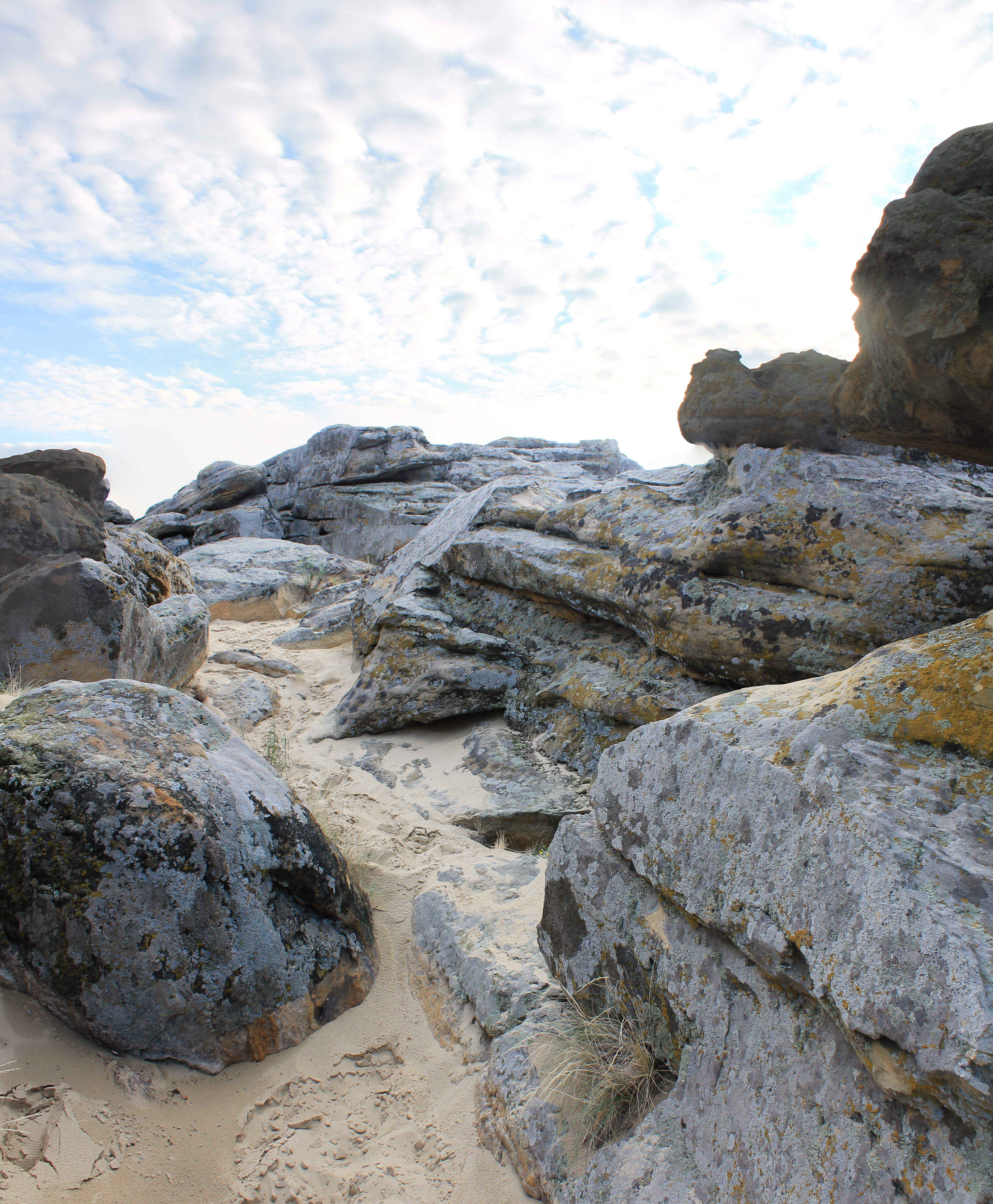 Пам'ятка природи "Кам'яна Могила" біля с.Терпіння Мелітопольського району